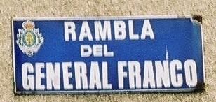 Plaque de rue au nom du Général Franco, Santa Cruz de Tenerife, Espagne